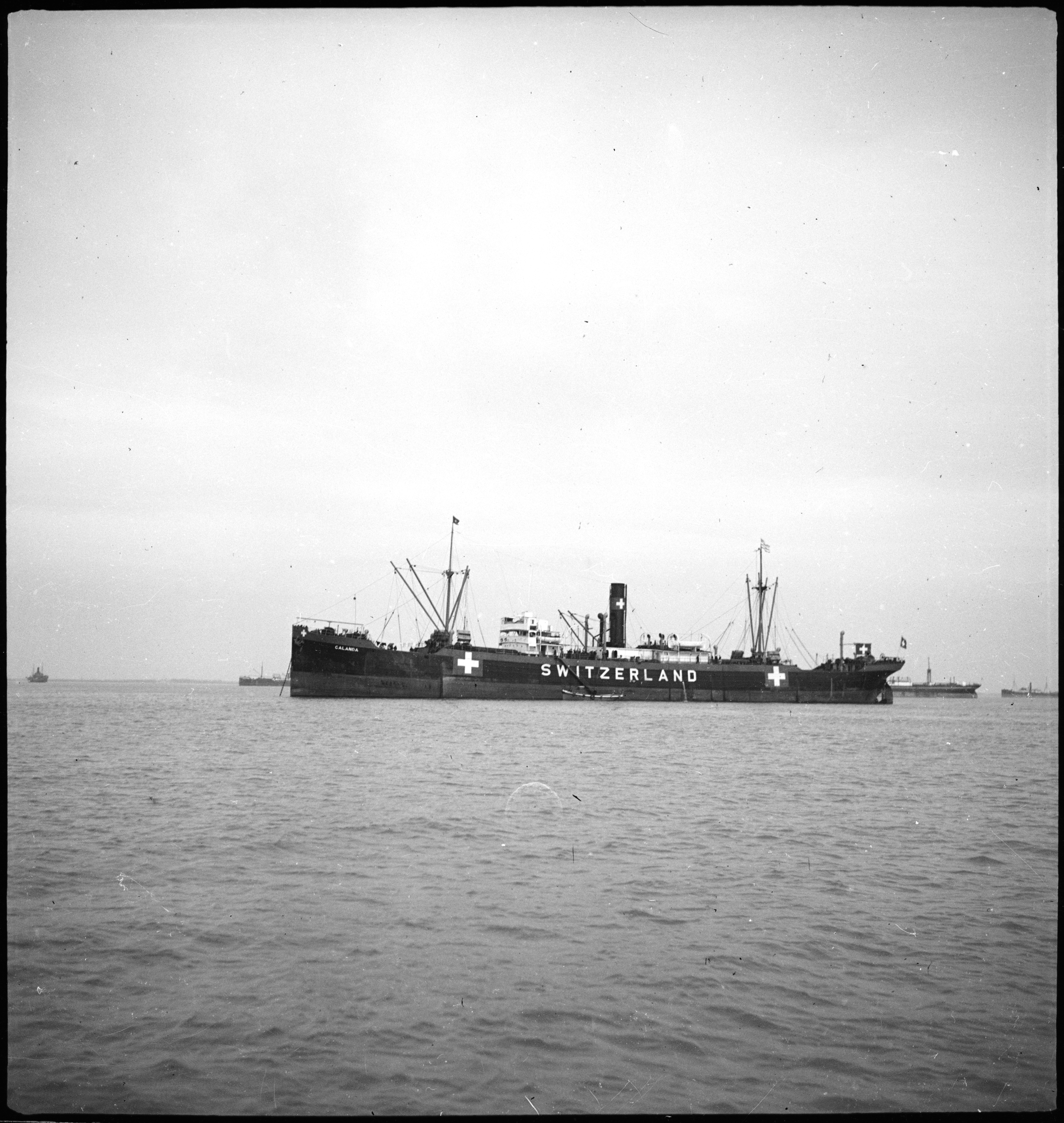 Portugal, Lissabon (Lisboa): Schiff Calanda; Ein Schiff mit Schweizer Flagge und angeschrieben mit Switzerland